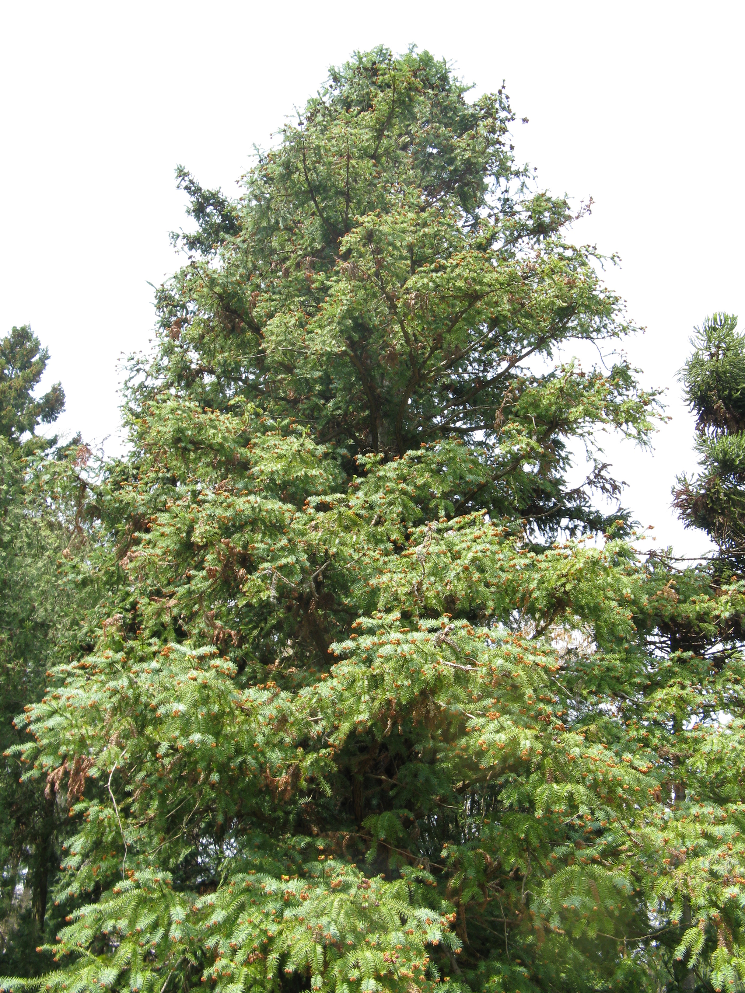 Cunninghamia lanceolata